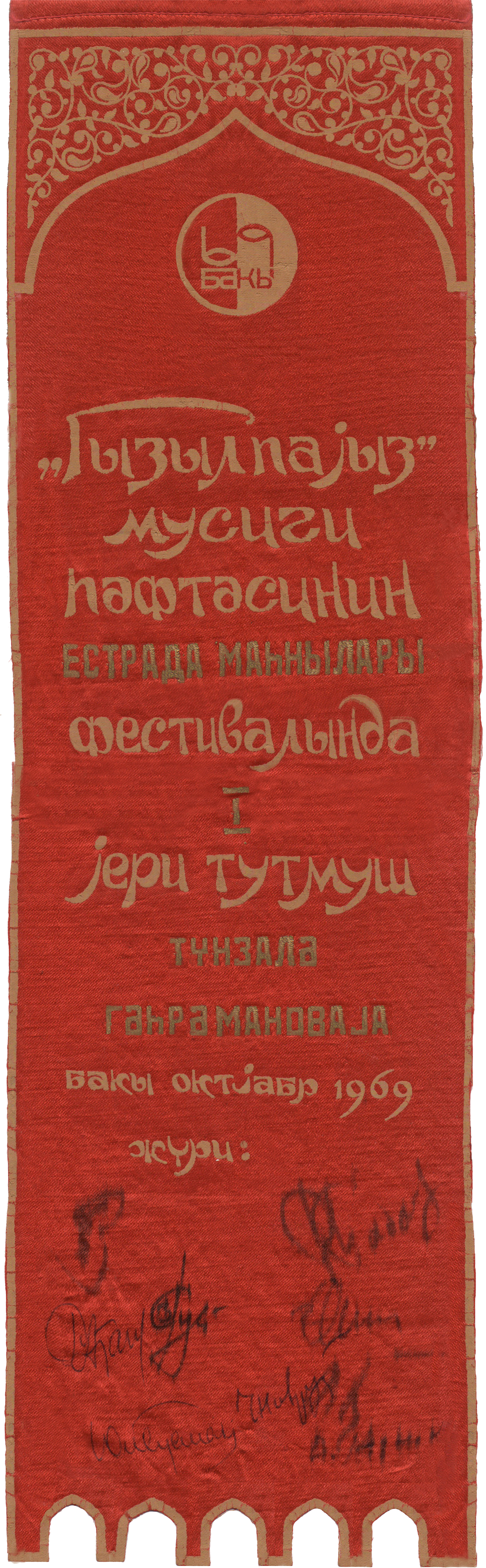 Tünzalə Qəhrəmanovanın qalib lenti. Qızıl payız festivalı, 1969